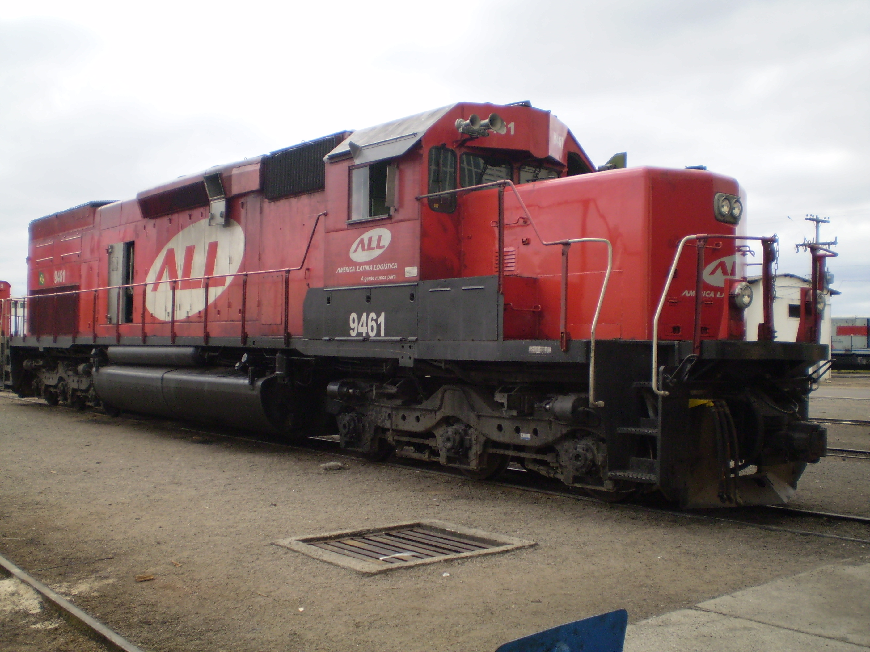 ALL 9461, GM SD40T-2 C-C Oficinas da ALL em Curitiba-PR-Brasil